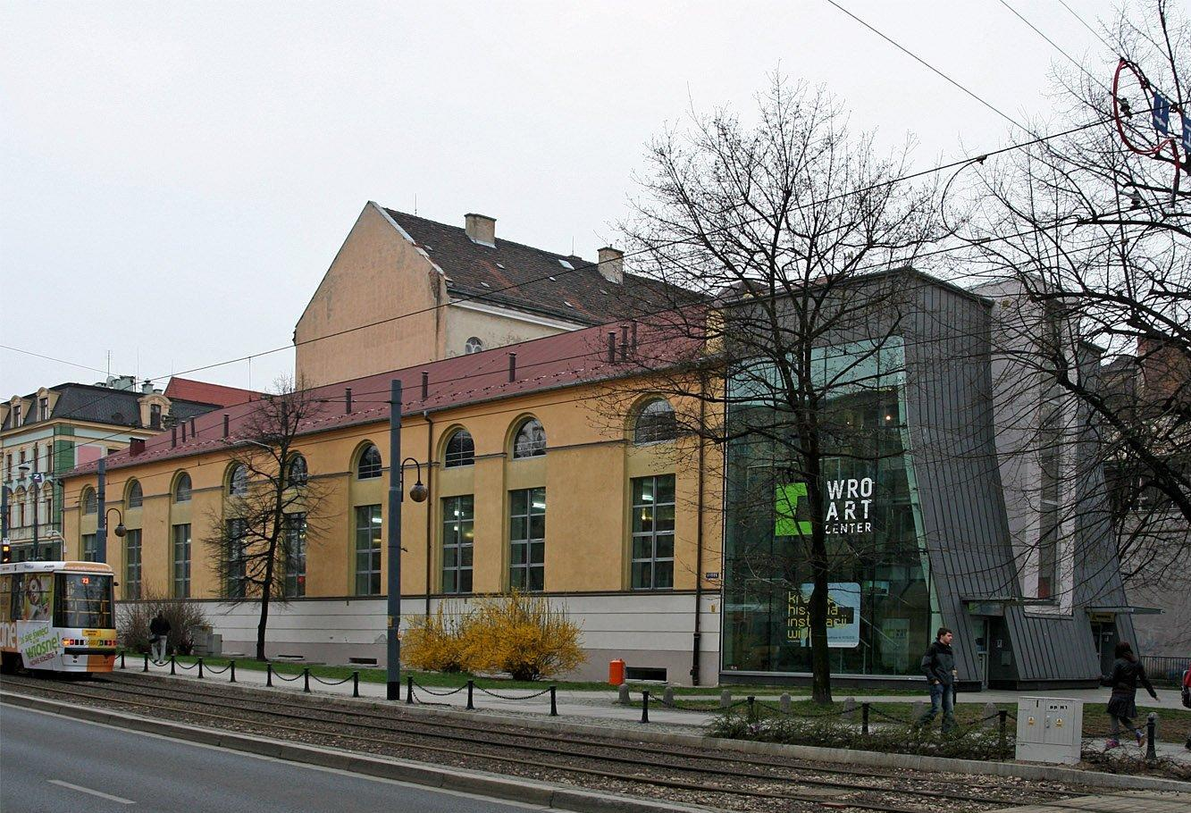 Budynek Mediateki z przybudówką, w której mieści się Centrum Sztuki WRO/WRO Art Center